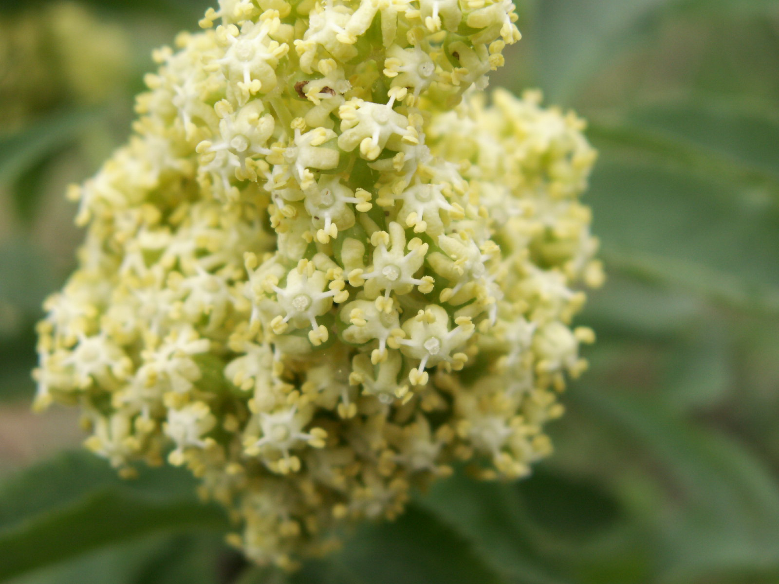 Bluete von rotem Holunder